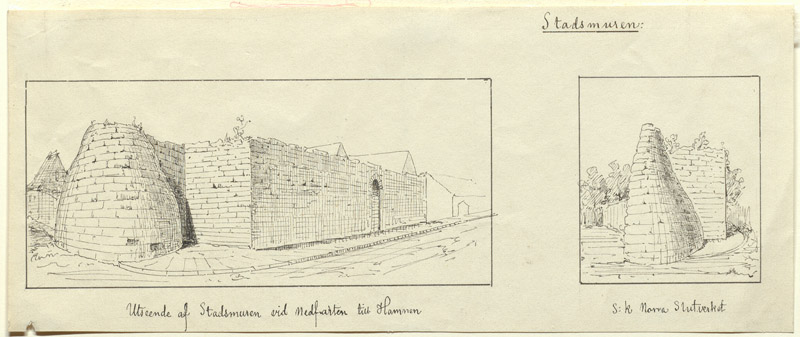 RAÄ-nr: Visby 105:1. Södra murhörnet vid Donnersplats, före rivningen 1866. Tuschteckning. Motiv: Visby 105:1 Nyckelord: Världsarv Kategori: Stadsvall/stadsmur, Teckning RAÄ-nr: Visby 105:1. Södra murhörnet vid Donnersplats, före rivningen 1866. Tuschteckning. Visby 105:1.